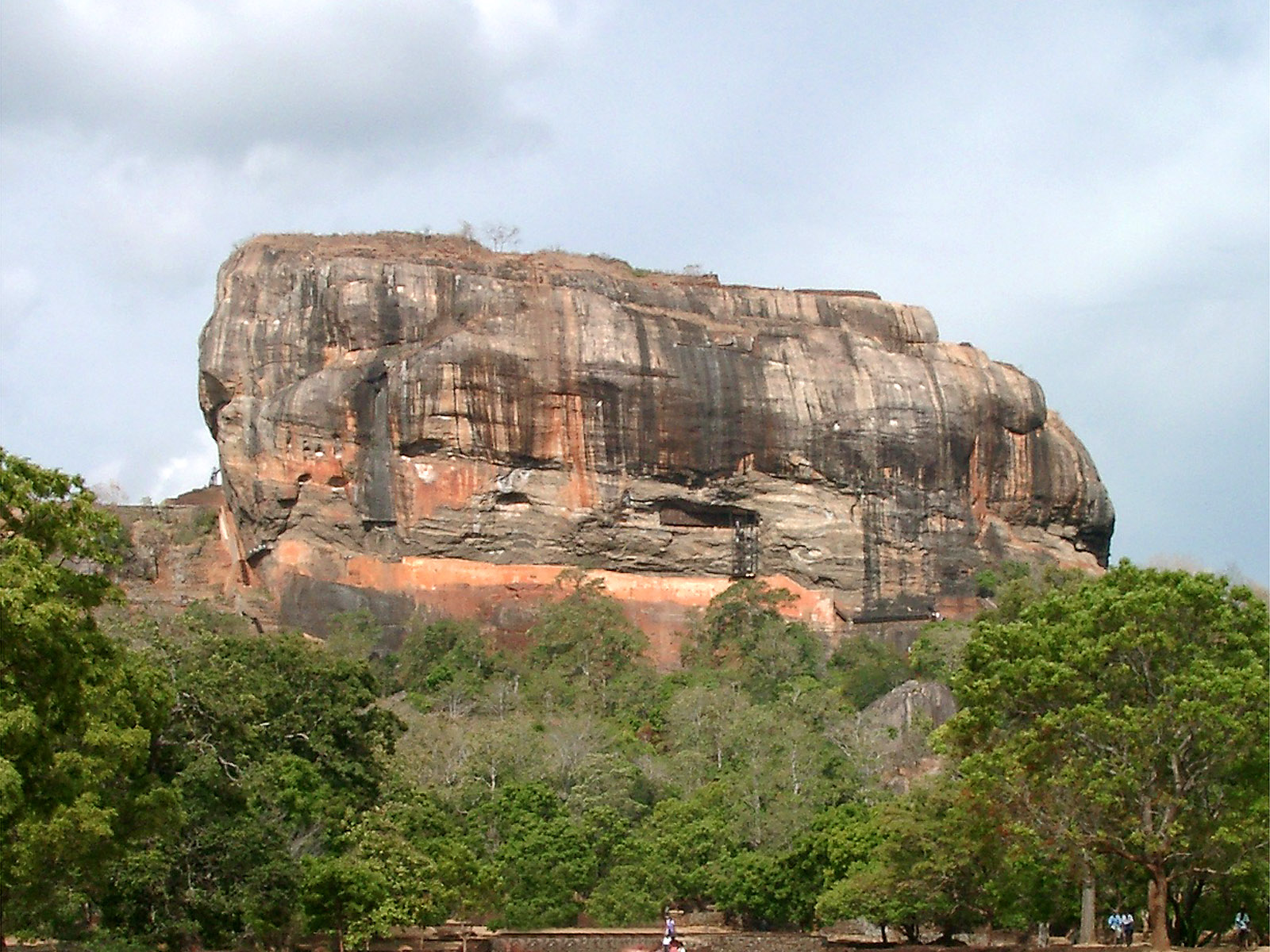 Sigiriya-Rock in Sri Lanka